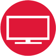 Logotipo TV TeleElx